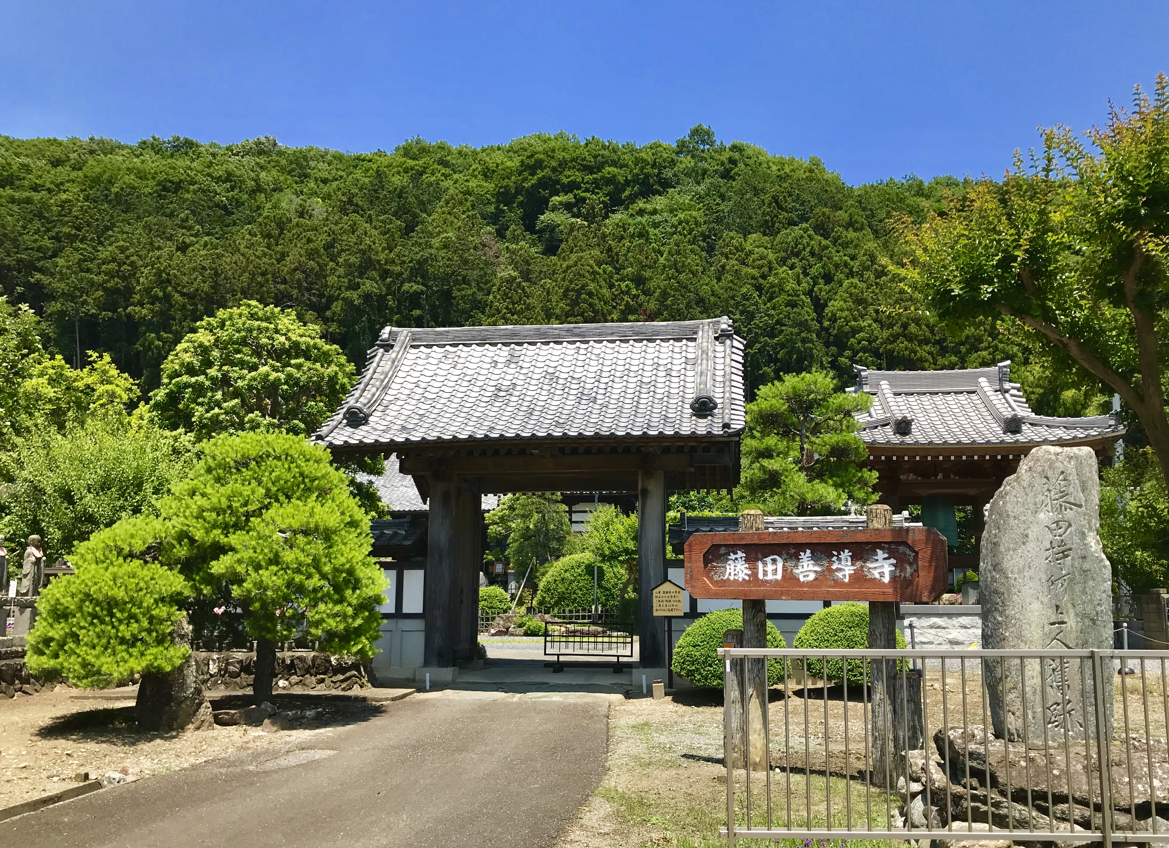 埼玉県大里郡寄居町の藤田善導寺